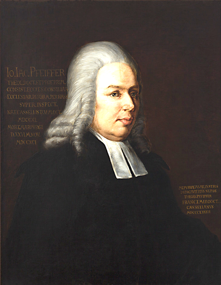 Johann Jacob Pfeiffer, 1779-1791 Professor der Theologie in Marburg (1740-1791)